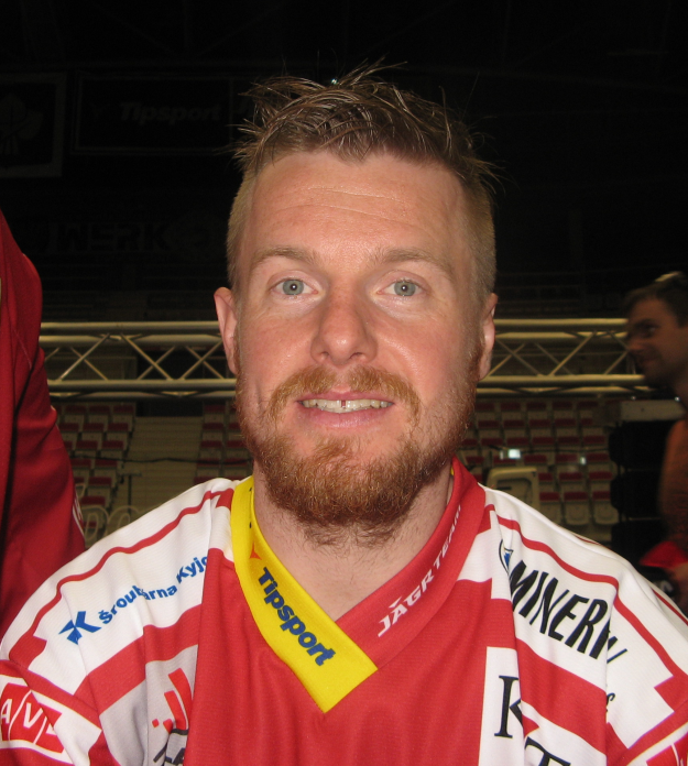 Po zakončení sezóny 2014/15 ve Werk Areně